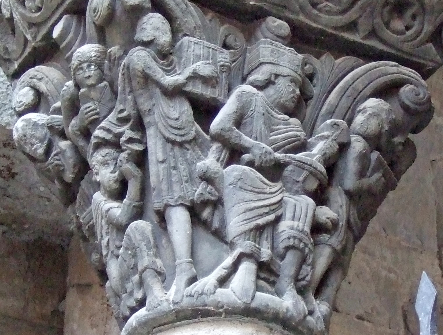 Jaca - Catedral - Portada Meridional - Capitel del Rey David y los músicos - Maestro de Jaca